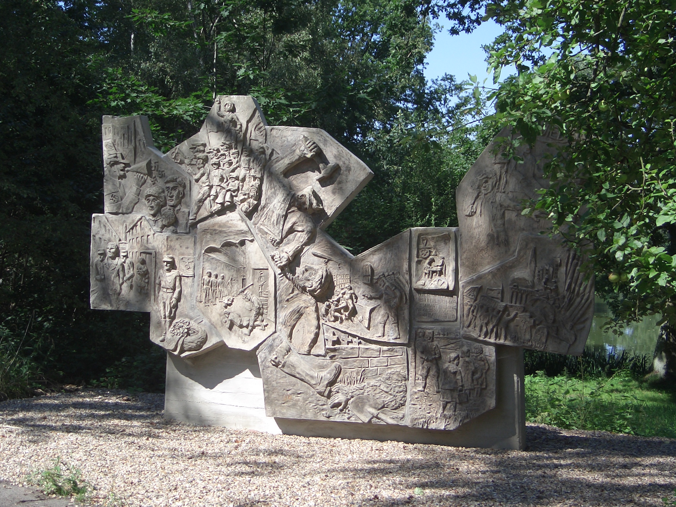 Mahnmal für die Ermordeten von Rieseberg